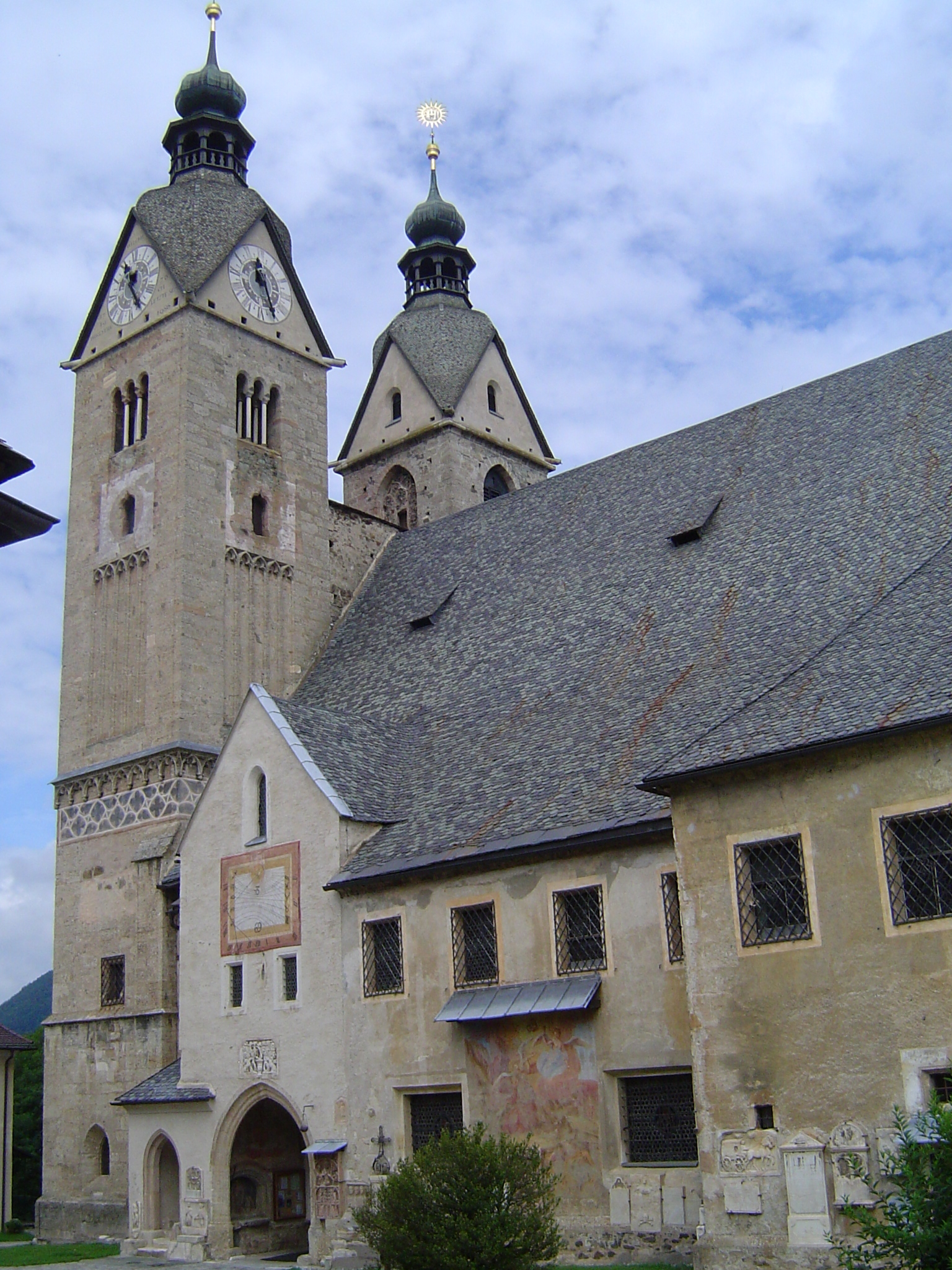 Maria Saal (sl.Gospa Sveta), pomembna cerkev in vasica na Koroškem